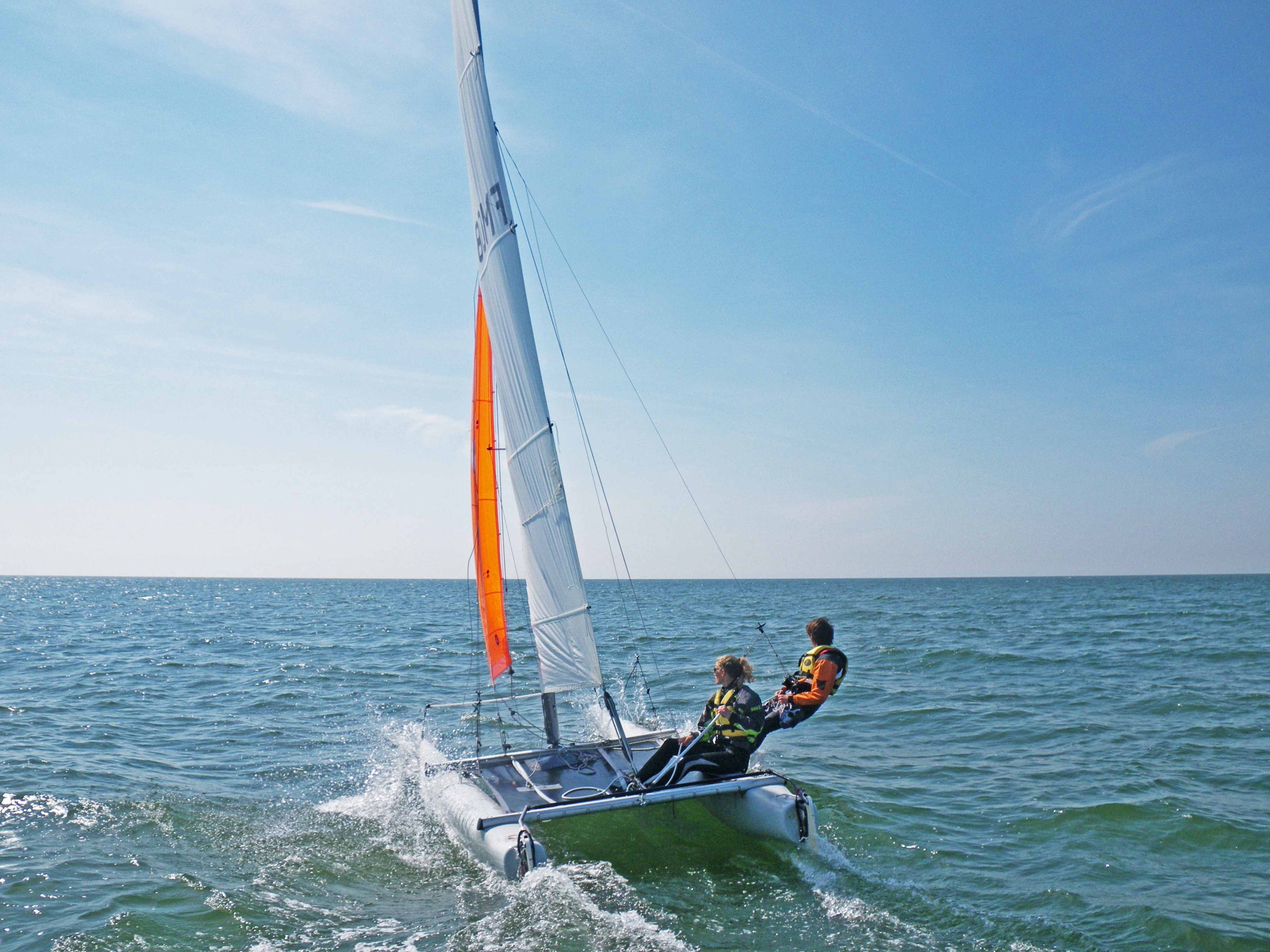 catamaran Fort Mahon Plage (EVEILS)